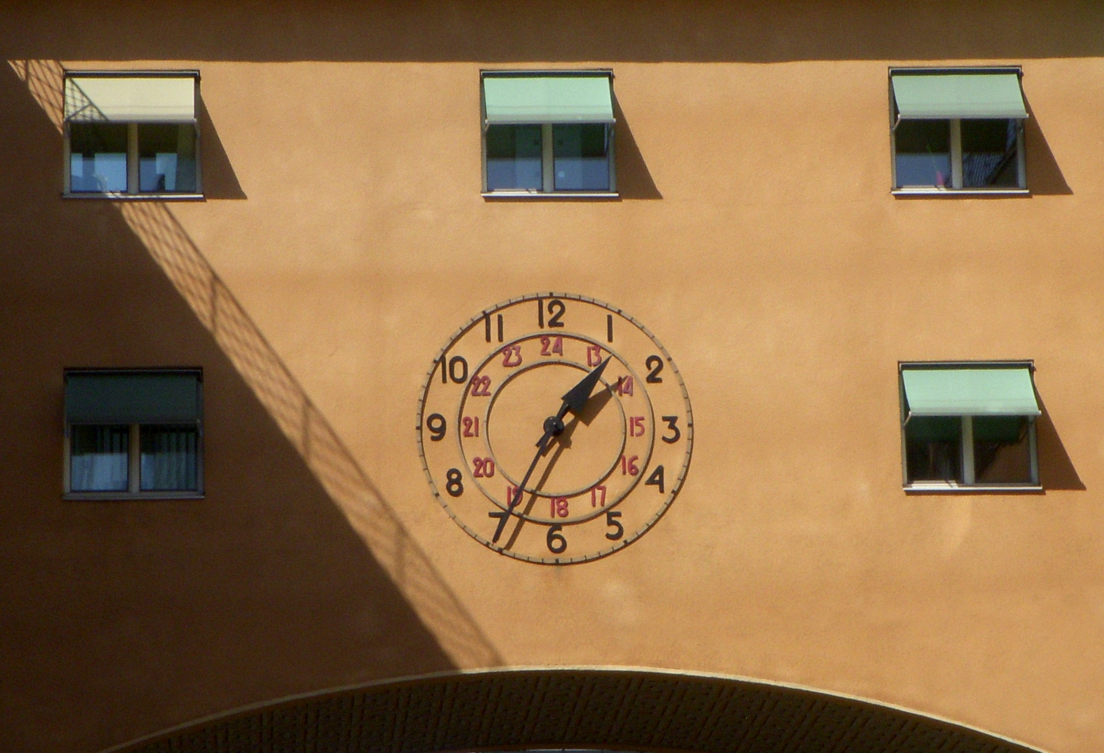 Klockan över Klara Norra kyrkogatan i Stockholm, Norrmalm